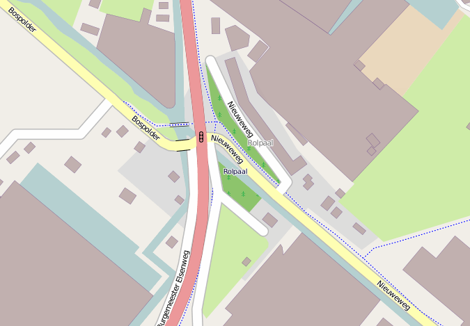 geografische kaart via [1]